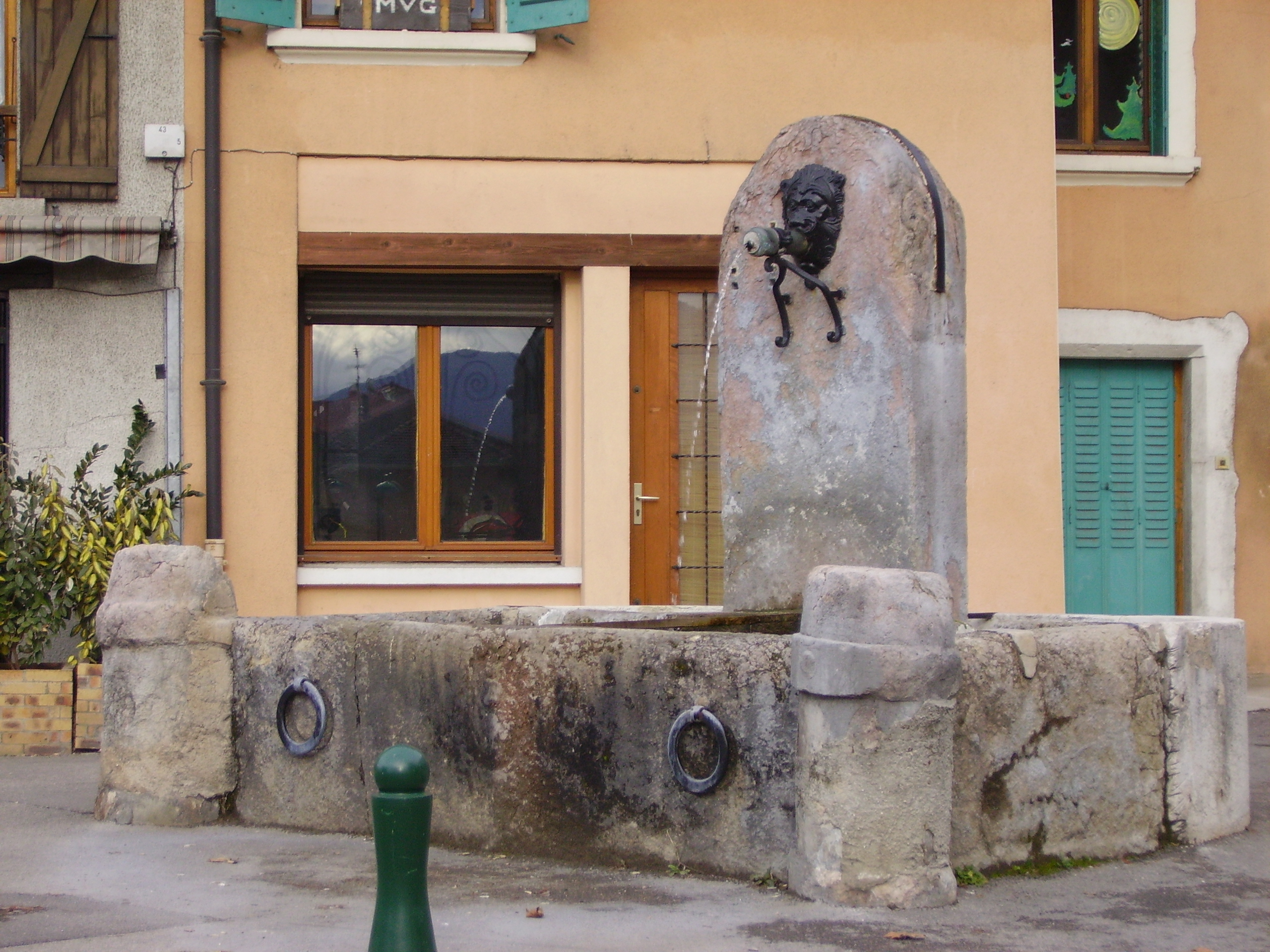 Fontaine Municipale de La Buisse